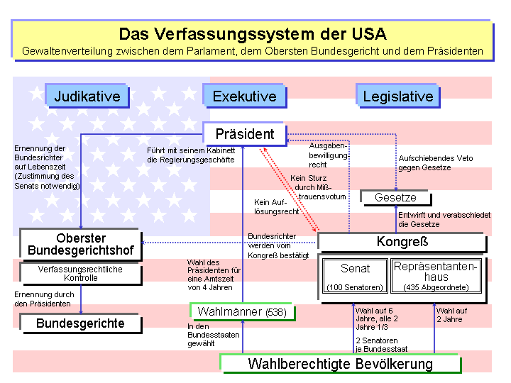 Titel: "Das Verfassungssystem der USA" Copyright: GNU-FDL